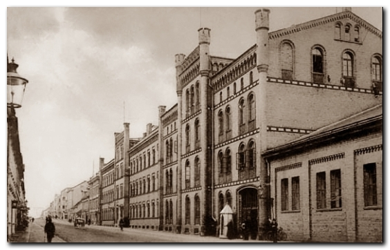 Kaserne Neustrelitz, II. Bataillon des Großherzoglich Mecklenburgischen Grenadier-Regiment Nr. 89.